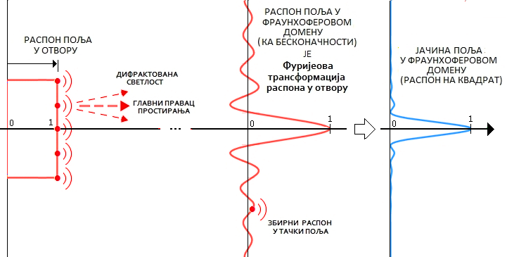 ФУРИЈЕОВА ТРАНСФОРМАЦИЈА ПОЉА ОТВОРА